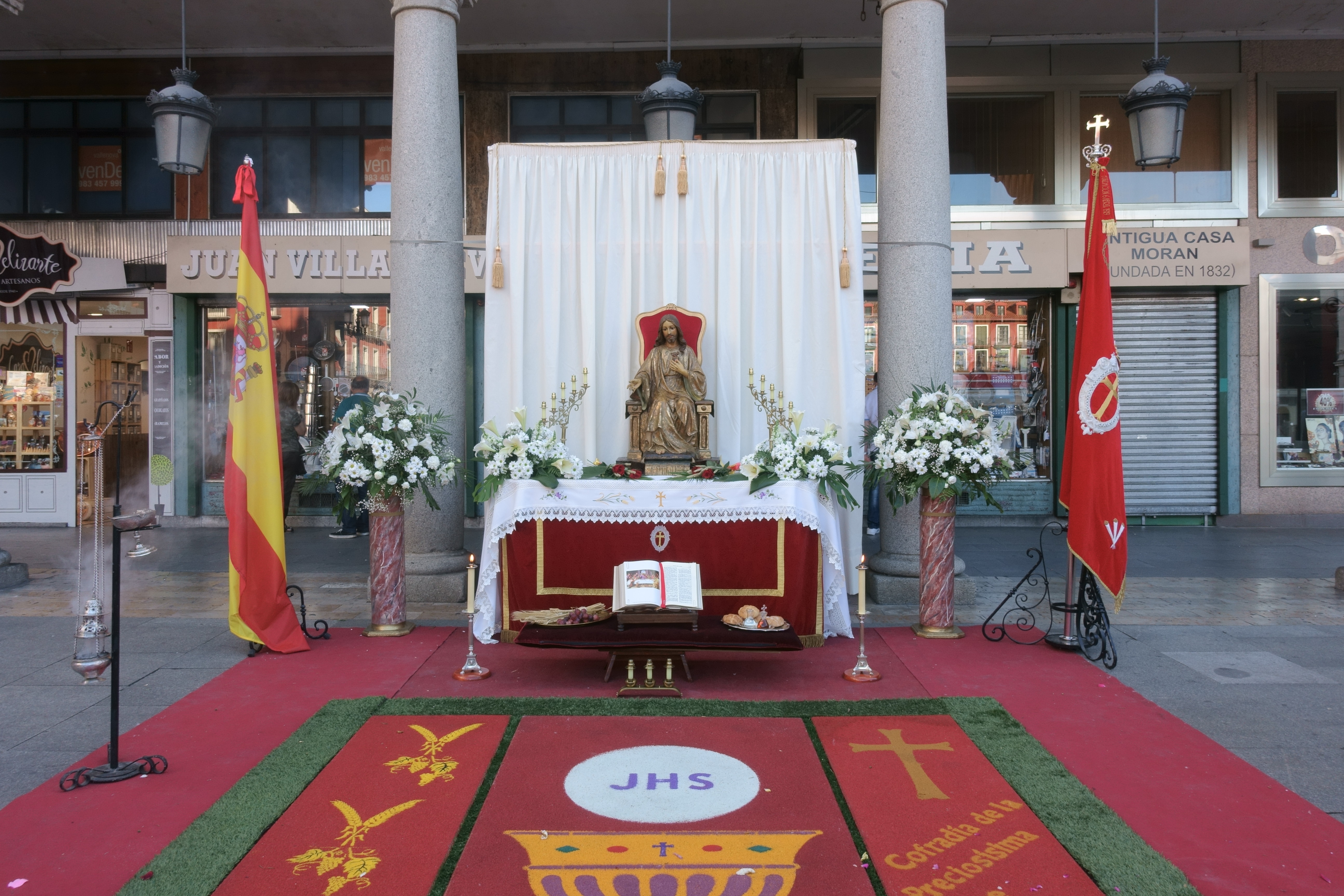 Procesión del Corpus Christi en Valladolid en junio de 2018.